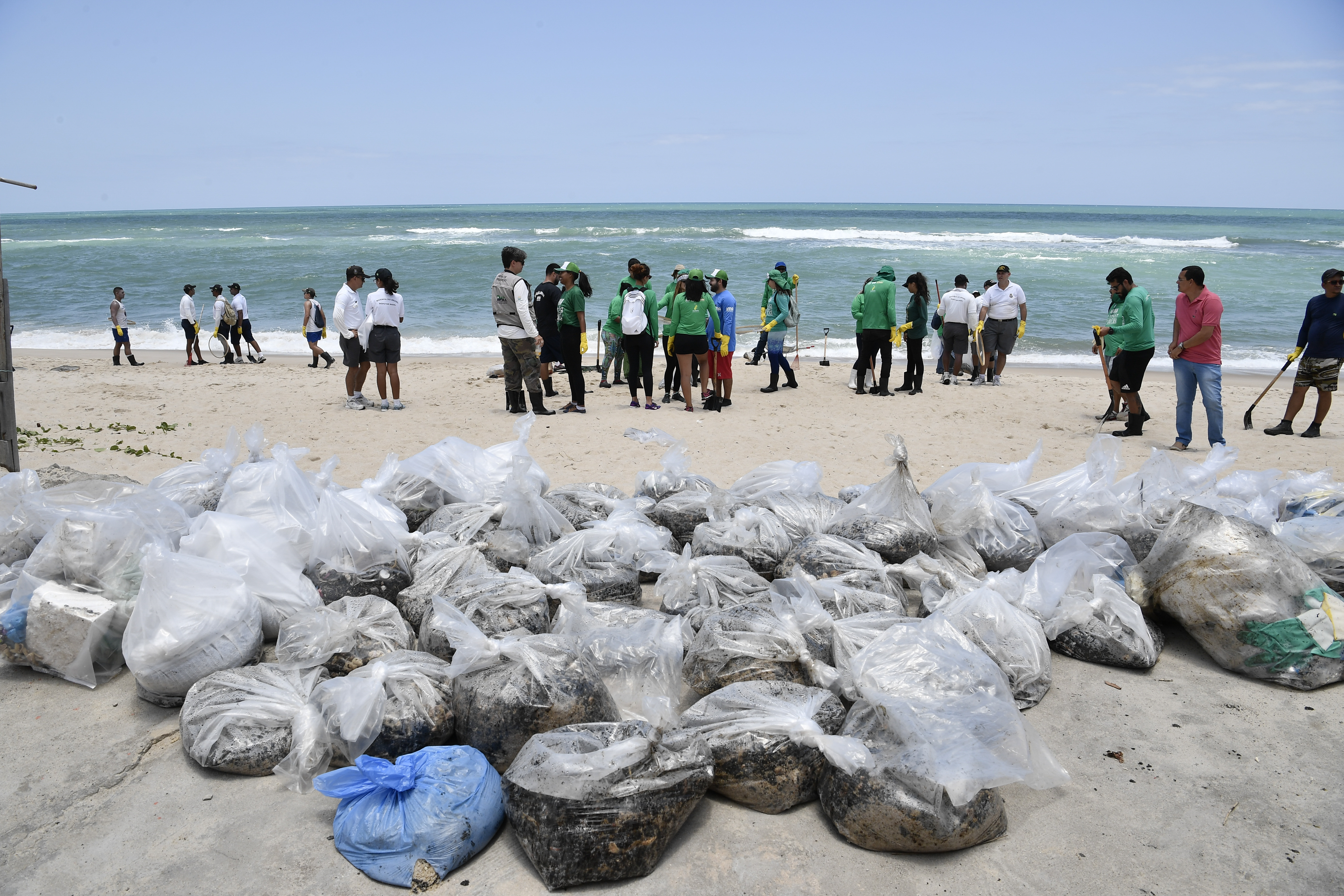 Voluntários ajudam na limpeza das áreas atingidas por petróleo no litoral de Alagoas. Foto: Marcos Brandão/Senado Federal